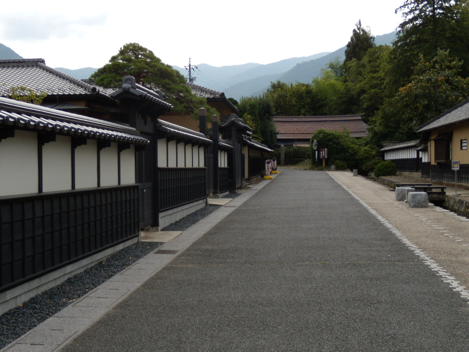 松代の街並み